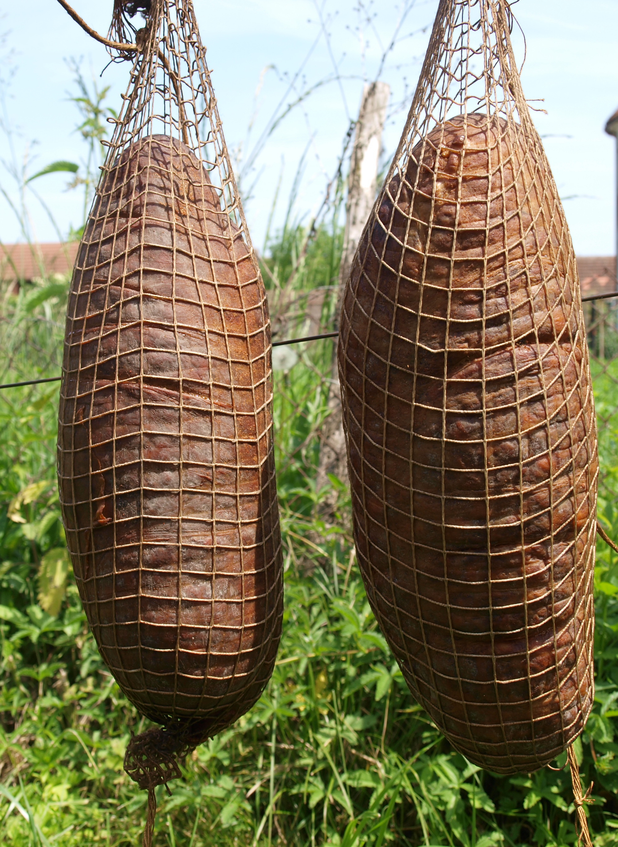 Slavonski kulin, osušeni.